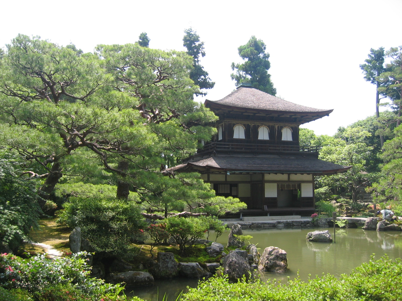 慈照寺(銀閣寺)